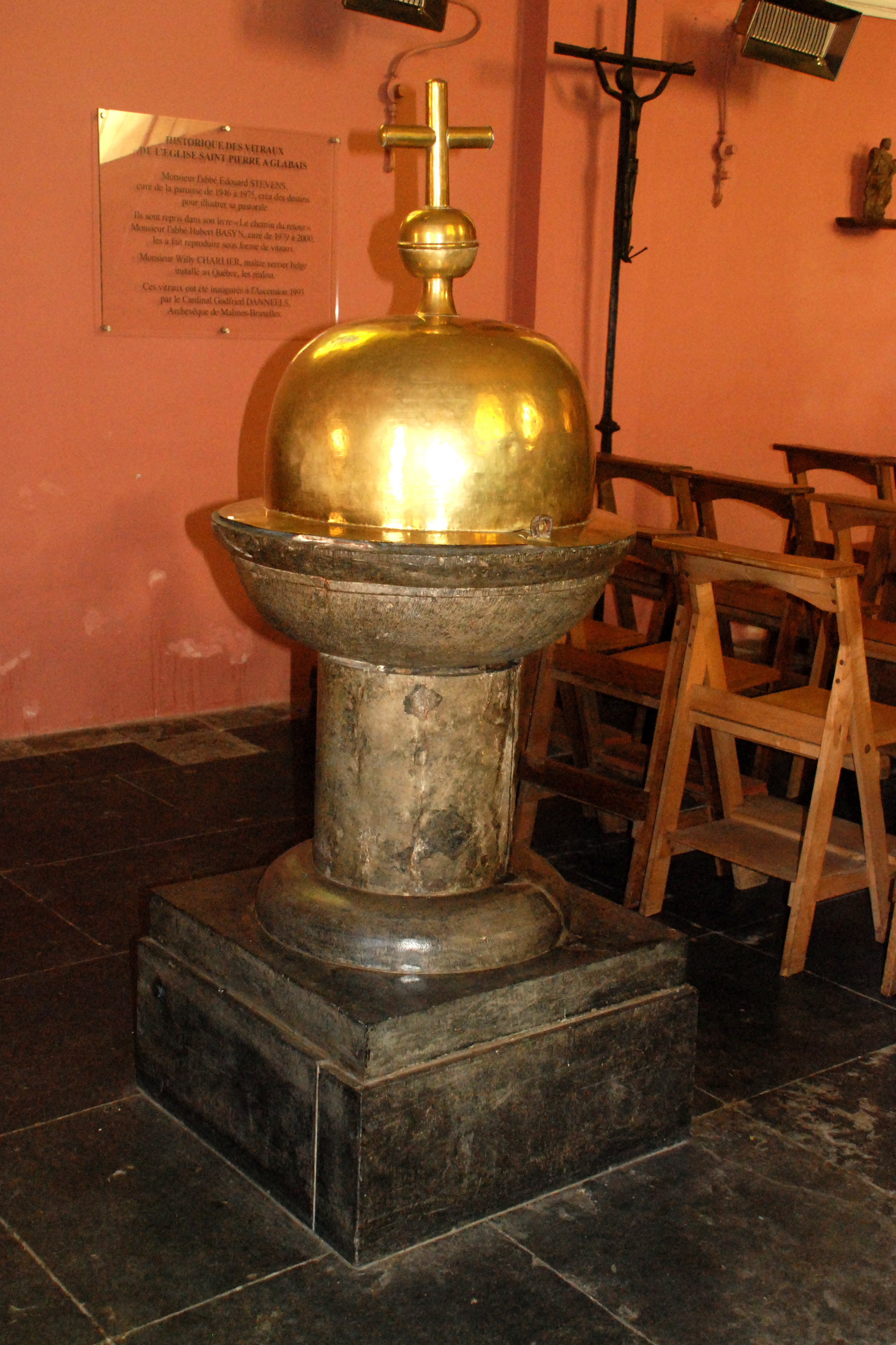 Belgique - Brabant wallon - Genappe - Glabais - Église Saint-Pierre